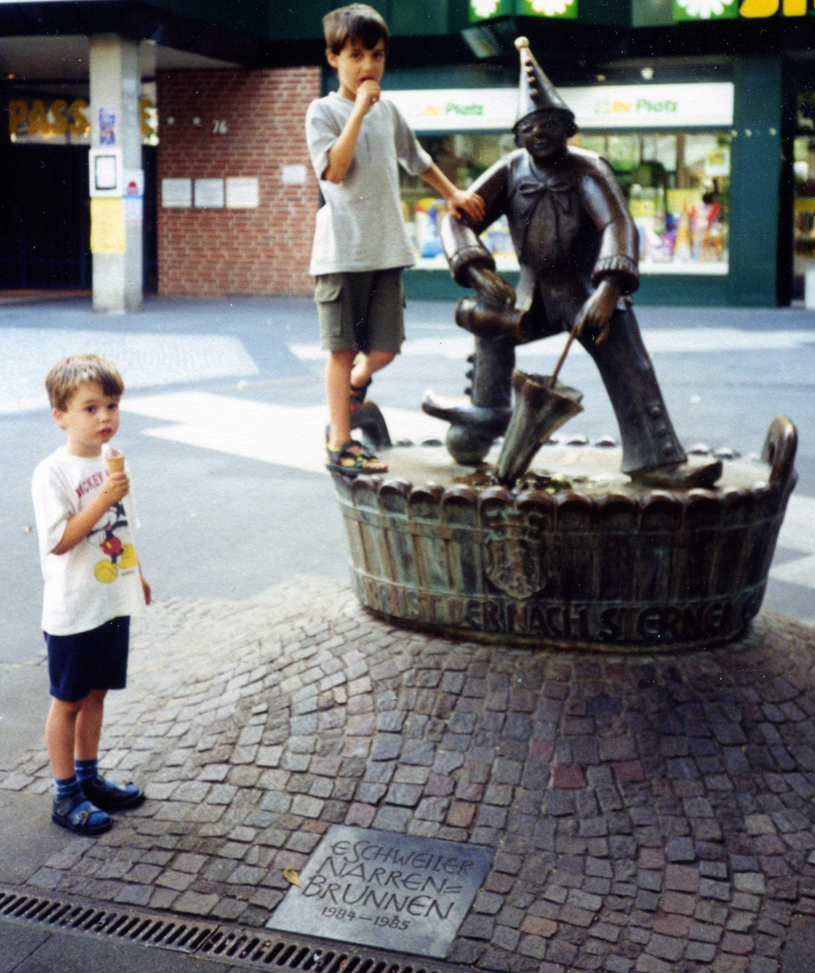 Eschweiler Karnevalsbrunnen in der Grabenstraße 2004 (Eschweiler Karneval)